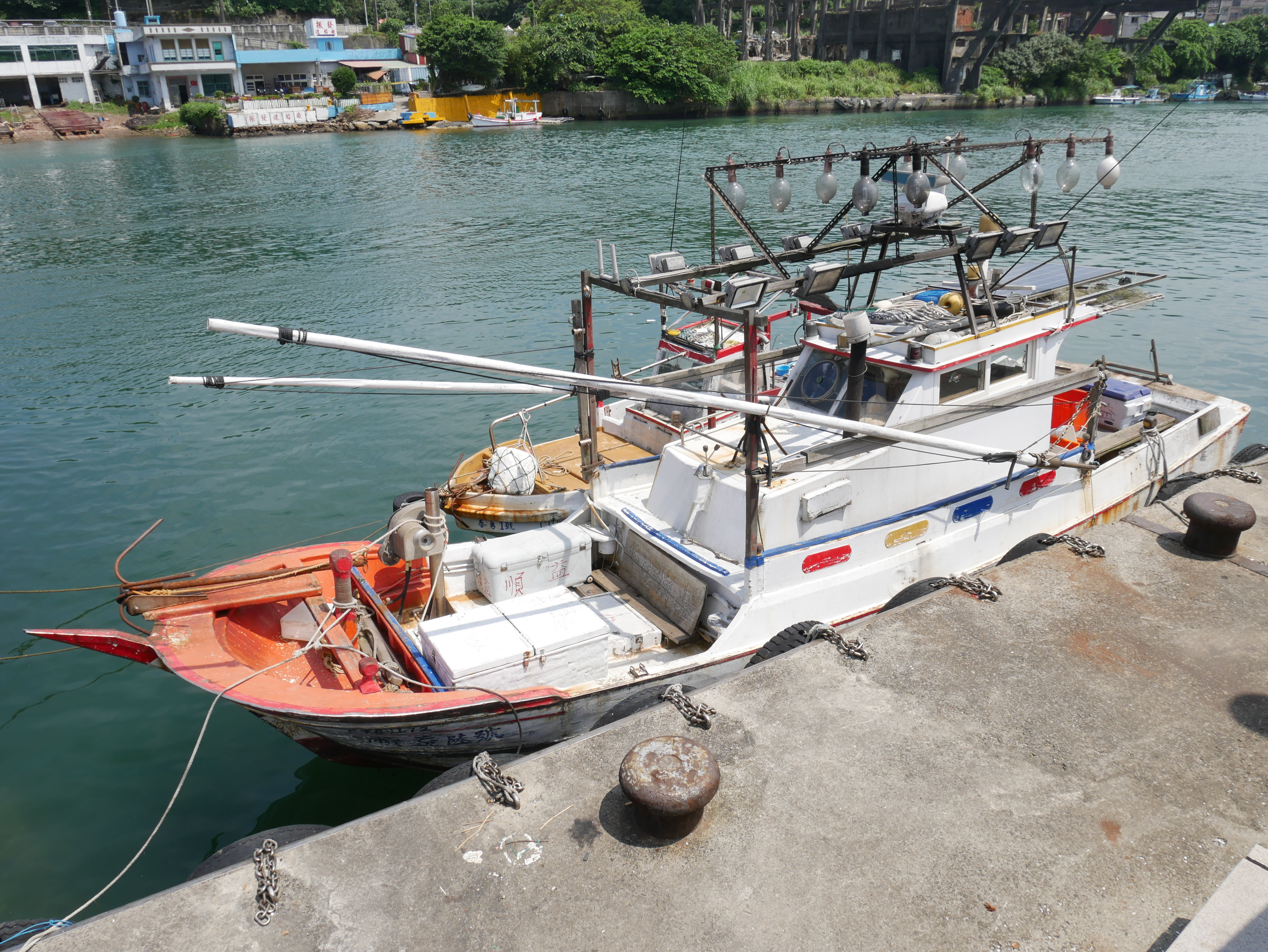 八尺門漁港內的順益6號與泰勇1號，基隆市中正區和憲里